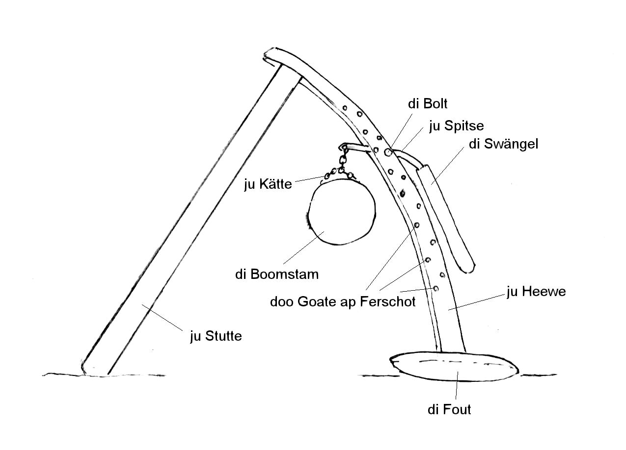 Seeltersk: Ju Heewe uum Boomstamme antoulichten.